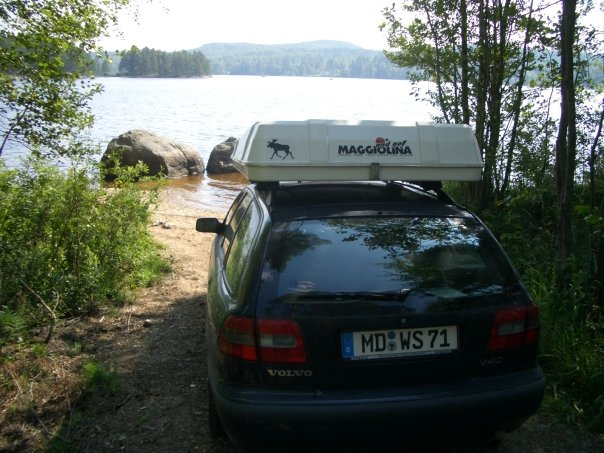 "Maggiolina online" Dachzelt, geschlossen, auf einem Volvo V40